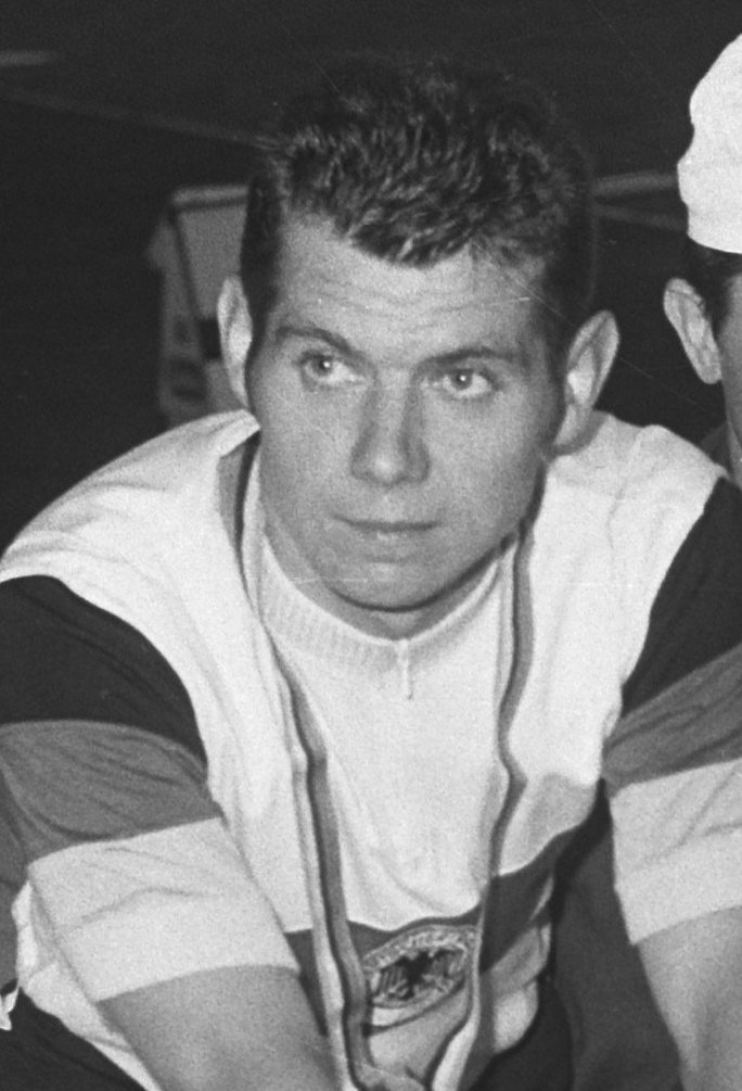 Collectie / Archief : Fotocollectie Anefo Reportage / Serie : [ onbekend ] Beschrijving : Wereldkampioenschappen wielrennen, Leicester, Engeland; finale amateurs stayers; ereronde van (Cornelis) Stam Datum : 12 augustus 1970 Locatie : Groot-Brittannië, Leicester Trefwoorden : AMATEURS, WIELRENNEN, ererondes, finales Persoonsnaam : CORNELIS Fotograaf : Fotograaf Onbekend / Anefo Auteursrechthebbende : Nationaal Archief Materiaalsoort : Negatief (zwart/wit) Nummer archiefinventaris : bekijk toegang 2.24.01.05 Bestanddeelnummer : 923-7454